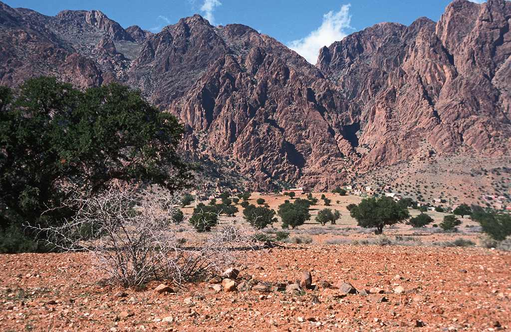 Antiatlas; weitgehend aufgegebene Ortschaft